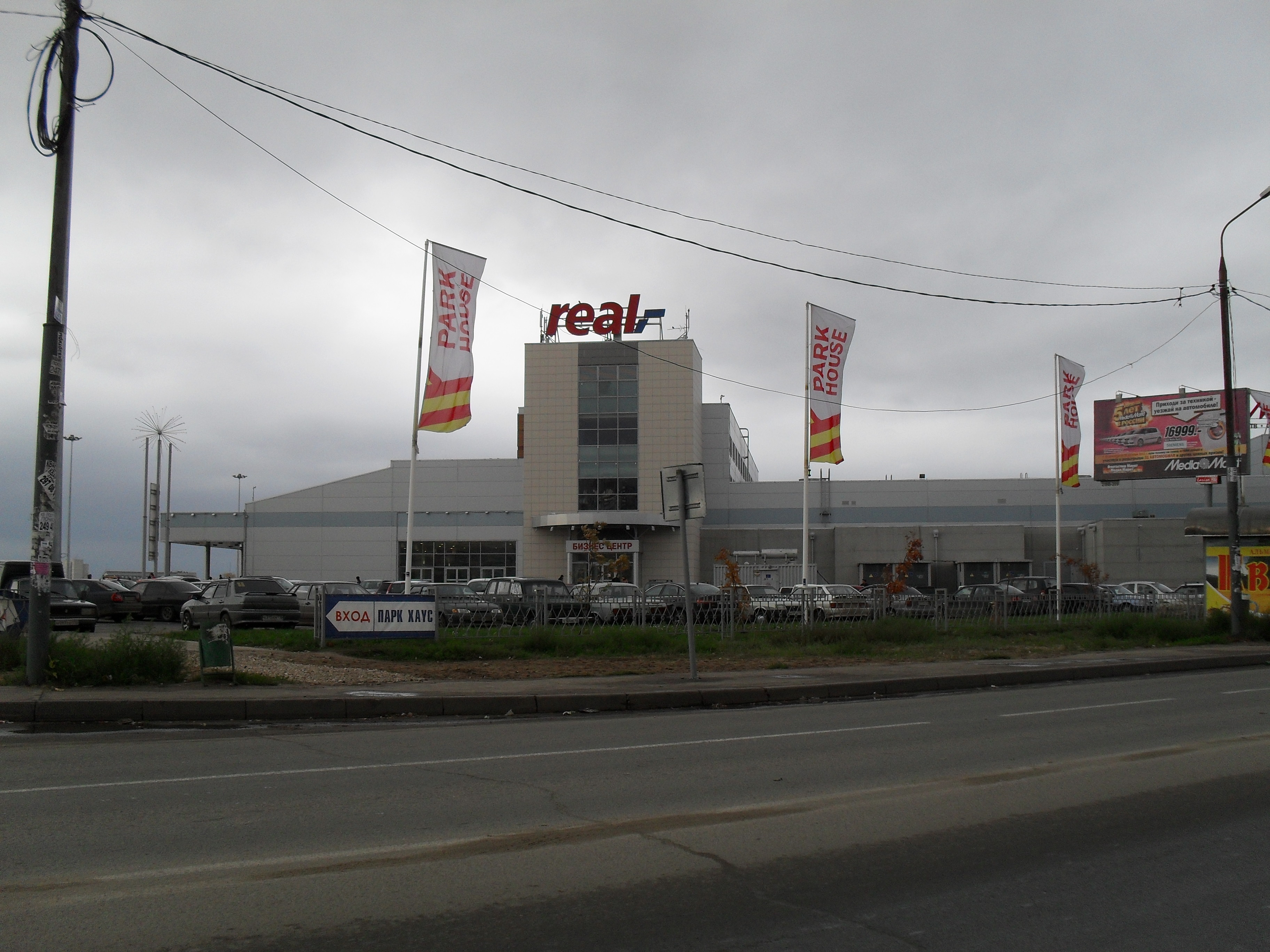 проспект Ямашева, гипермаркет Реал